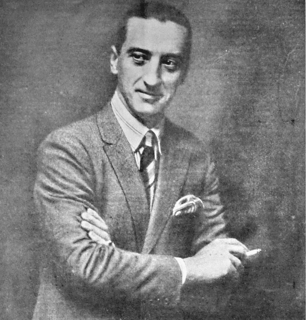 Retrato oficial de Carlos M. Noel correspondiente a su primer período como intendente de Buenos Aires, 1922-1925.